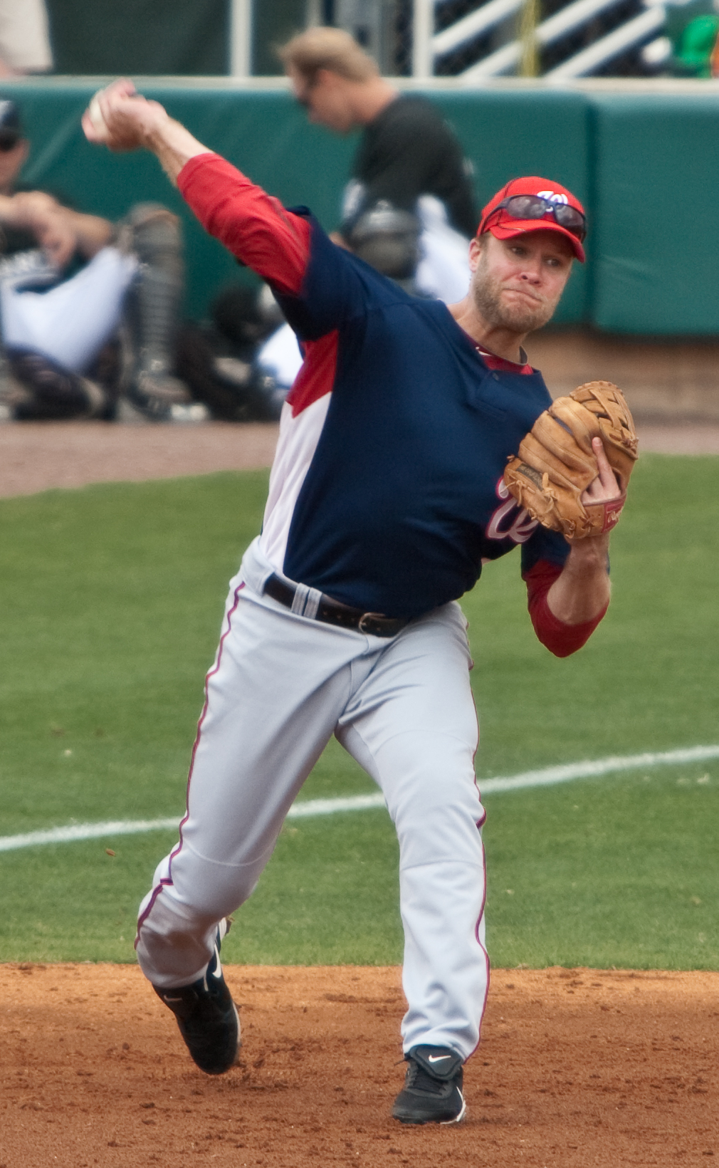 Eric Bruntlett